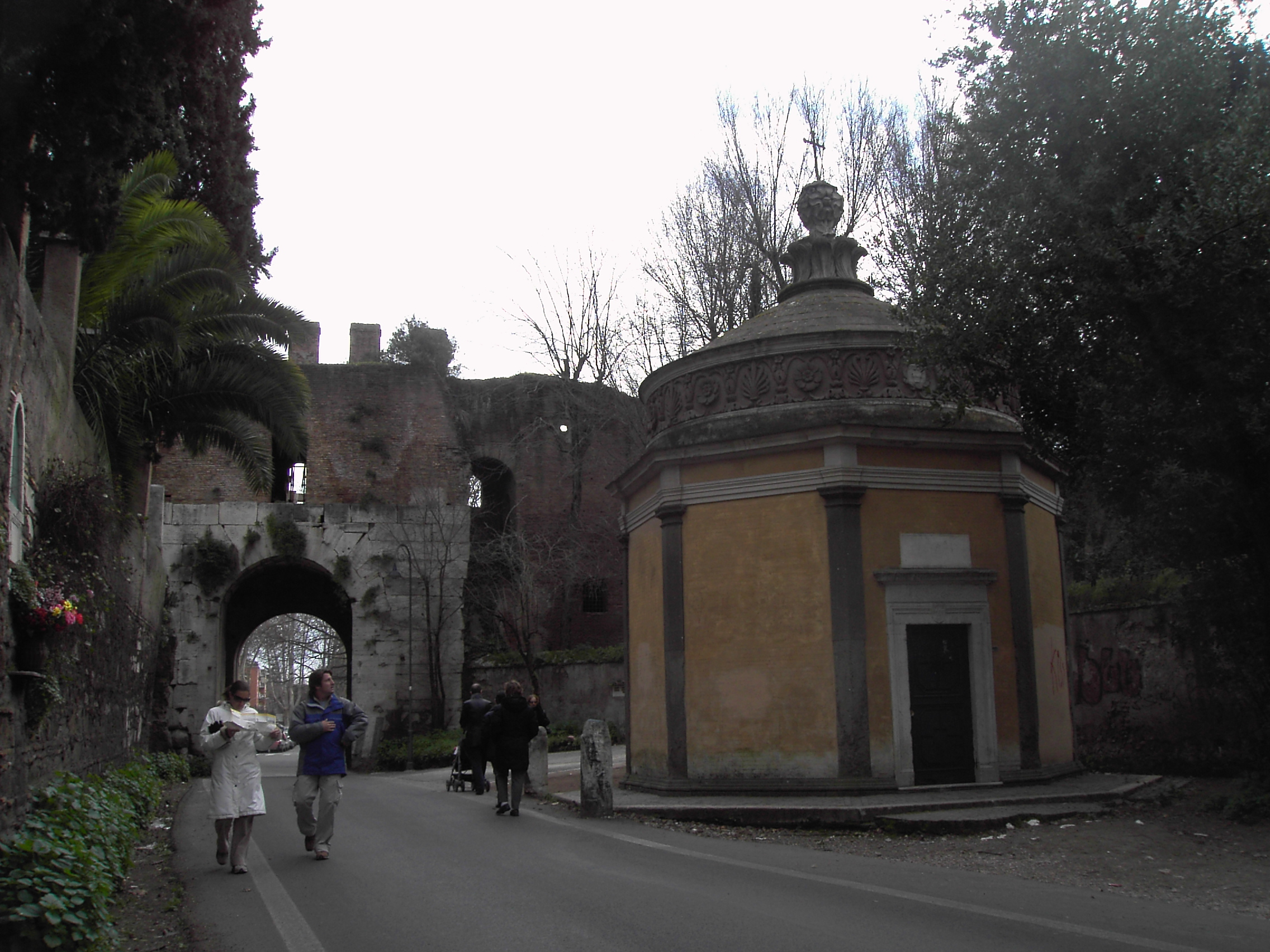 Roma , Porta Latina (interno, con s. Giovanni in Olea)